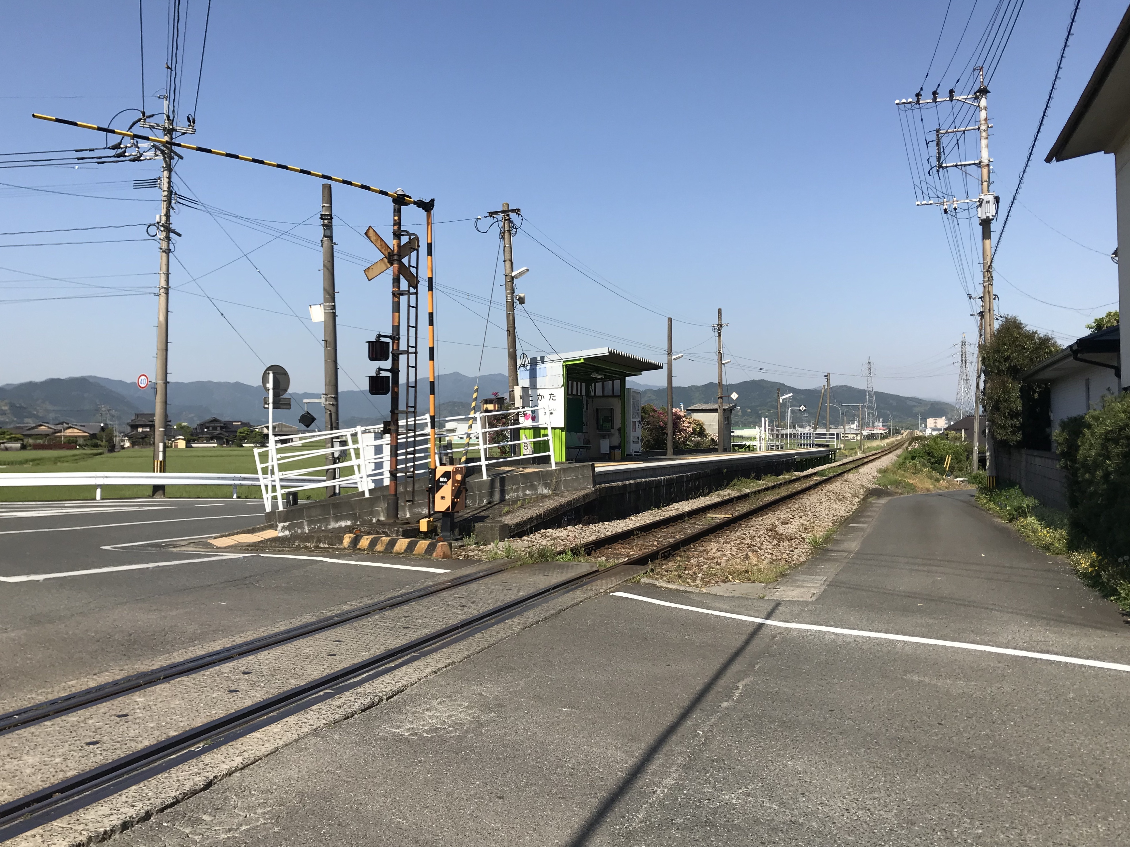 高田駅の全景